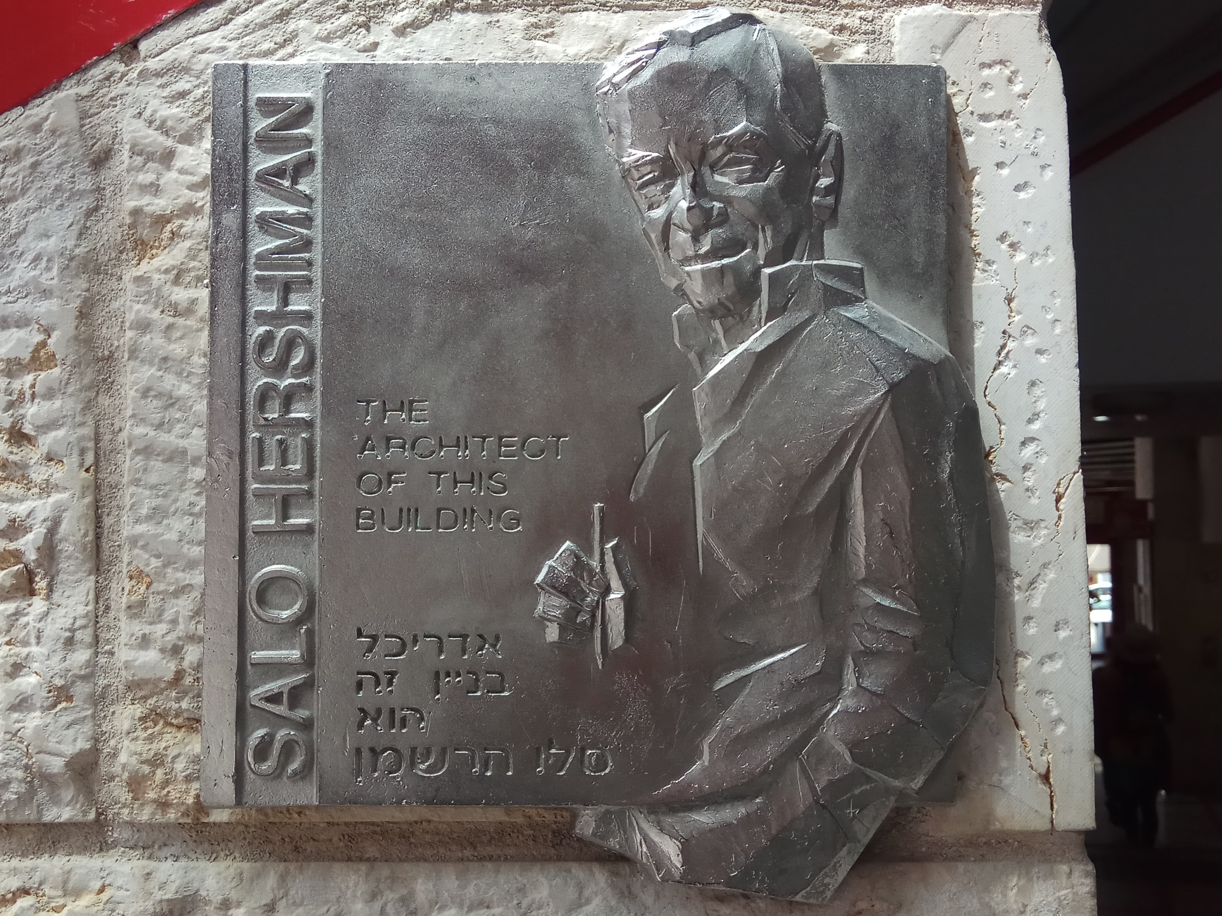 תבליט הקדשה לסלו הרשמן בסימנטק תל אביב